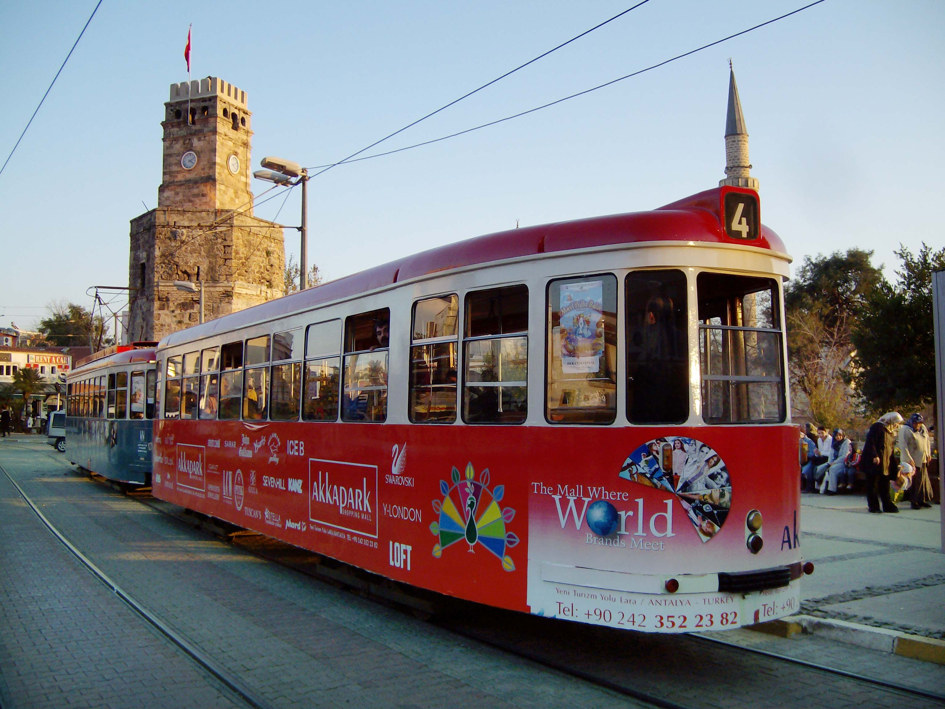 Antalya .tr – Straßenbahn vor der Kulisse des Uhrenturms und dem Minarett der Mehmet-Pasa-Moschee.